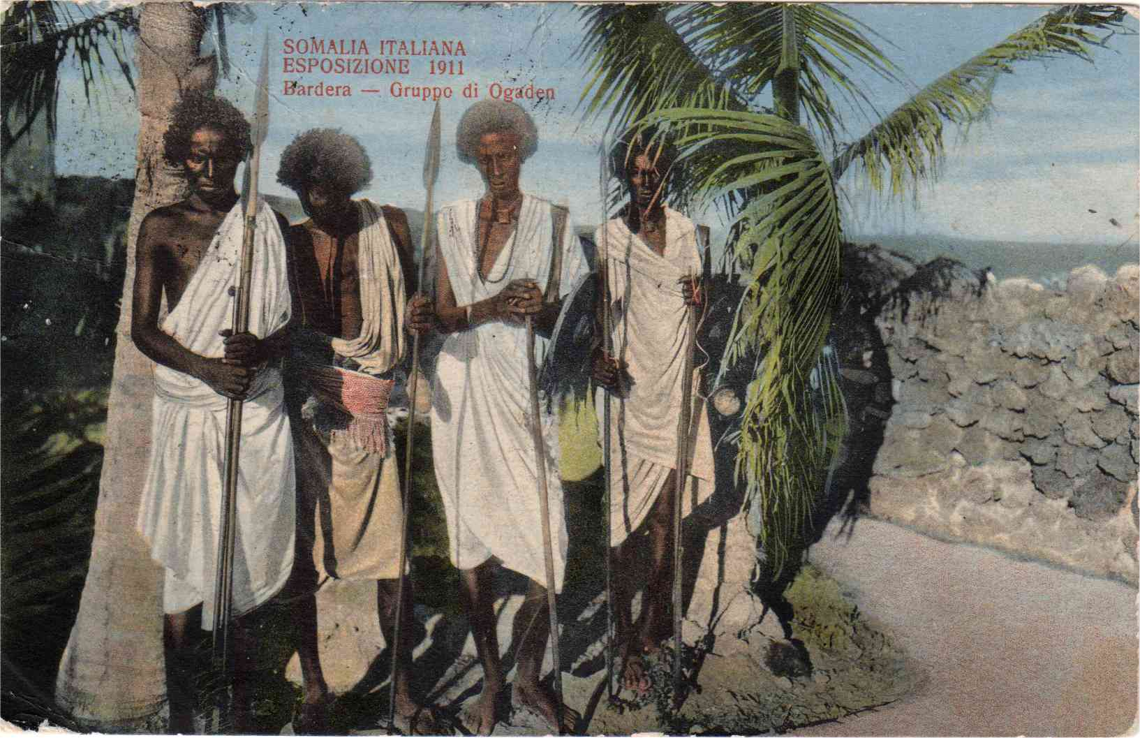 Africa Orientale - Somalia italiana -Esposizione 1911 - Bardera - Gruppo di Ogaden scritta il 10 giugno 1913